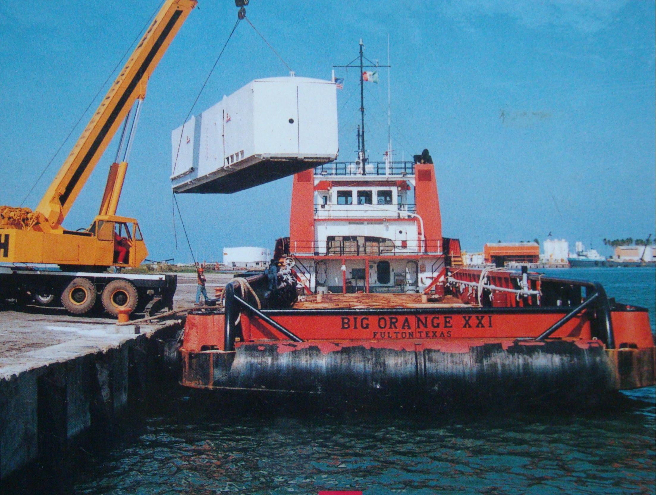 Descarga de un barco en el muelle de la terminal de usos múltiples en el puerto de Dos Bocas